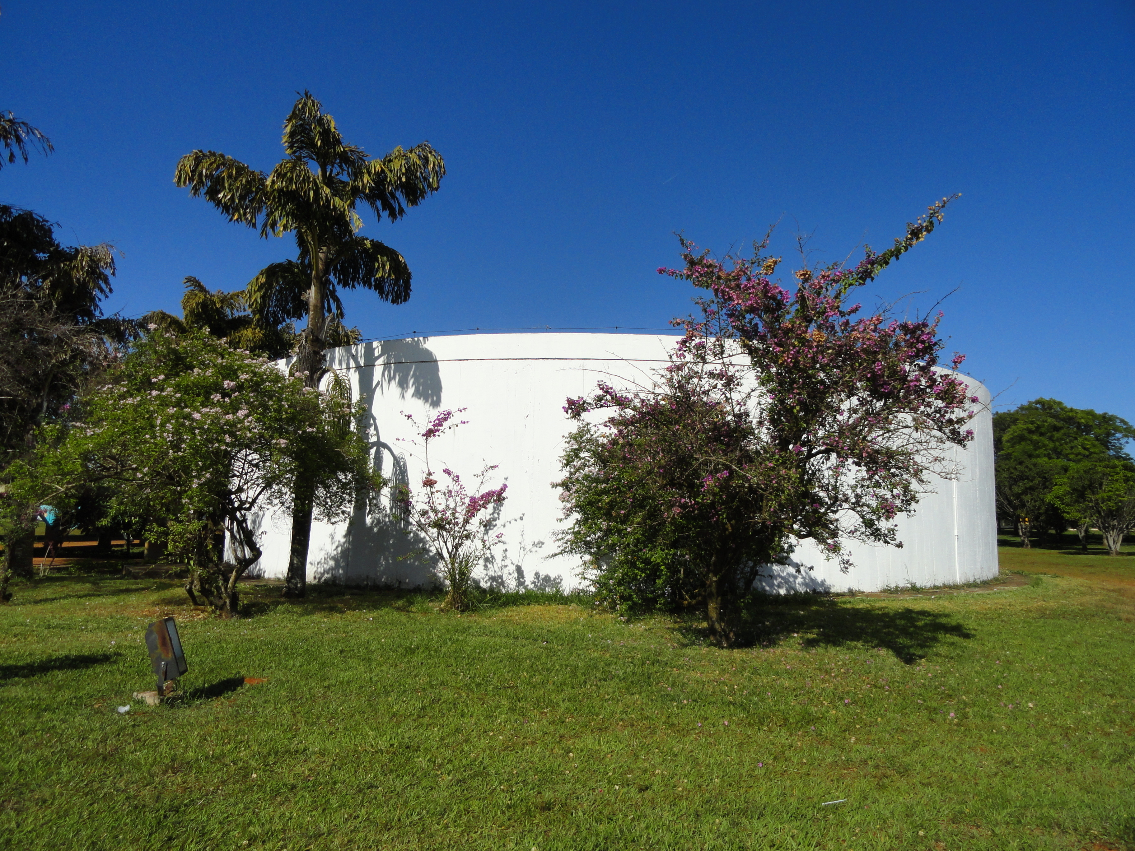 Sala Cássia Eller, Brasília, Brazil.